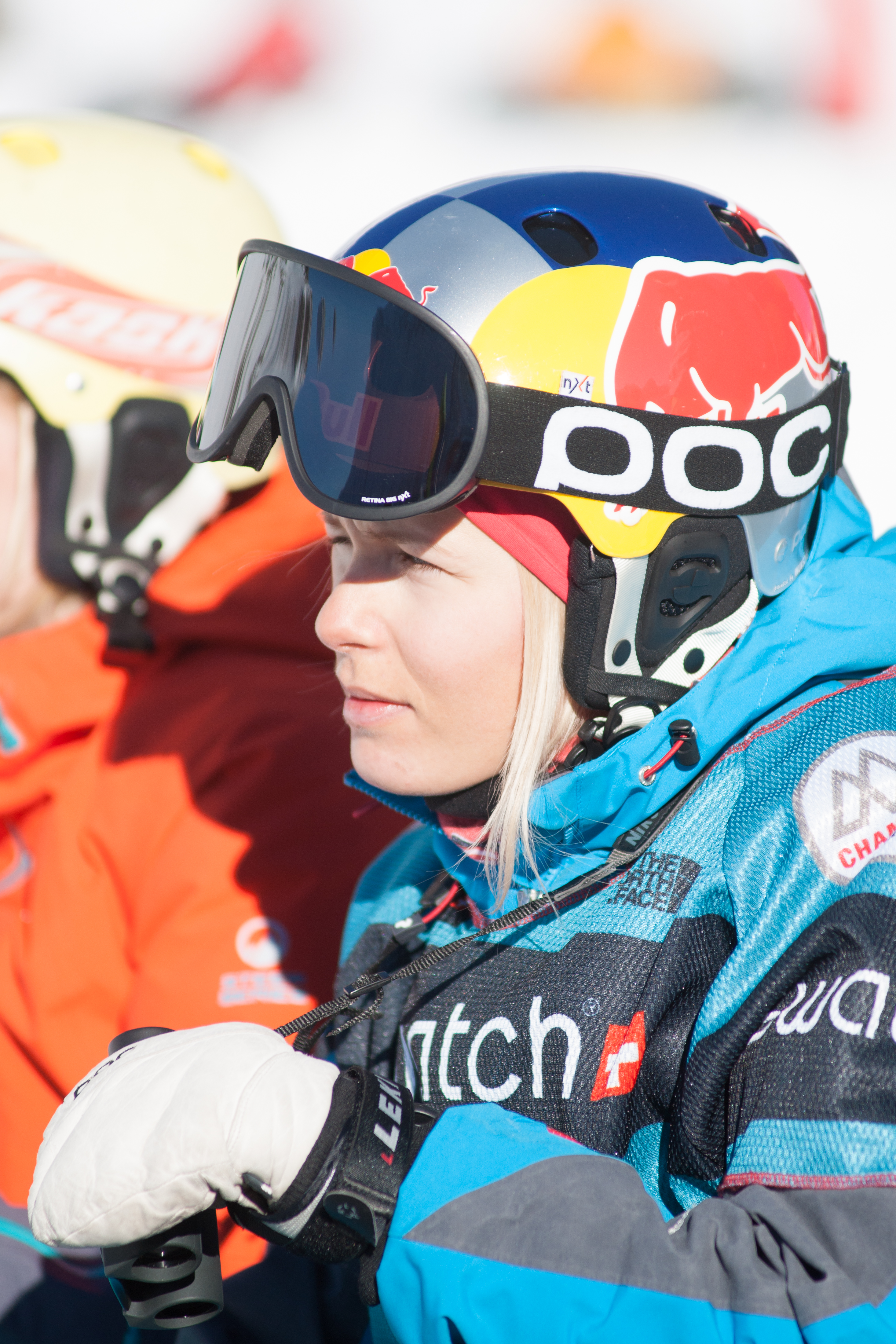 Freeride World Tour 2014 Chamonix - Matilda Rapaport